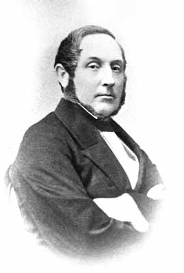 August Wilhelm Boström (1809–1882), Viljandi raehärra ja bürgermeister